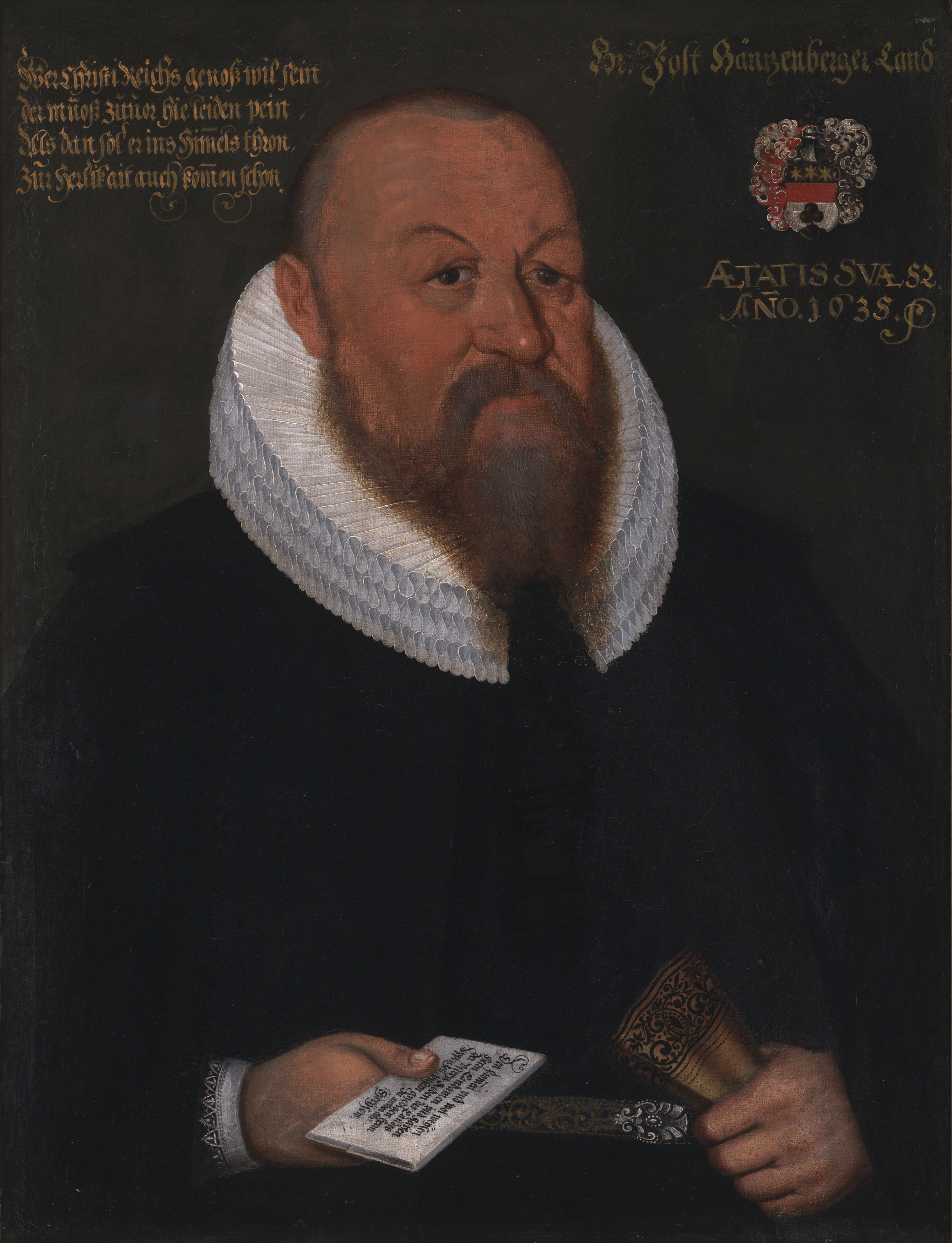 5. Landammann von Appenzell Ausserrhoden, Brustbildnis